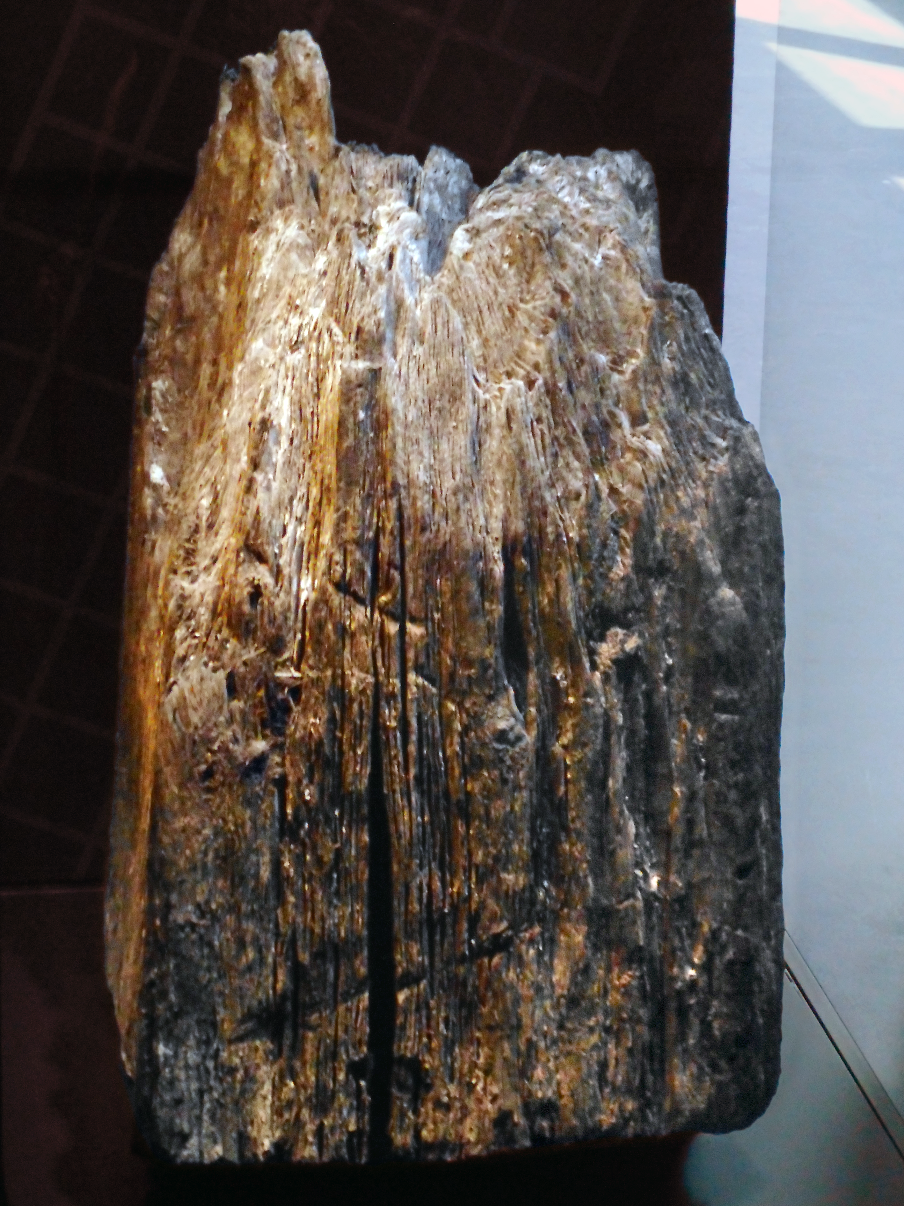 Kastell Aalen: Eichenträger der hölzernen Vorhalle des Stabsgebäudes; 160 ± 10 n. Chr. Archbau GmbH Bayern, Studienfahrt.